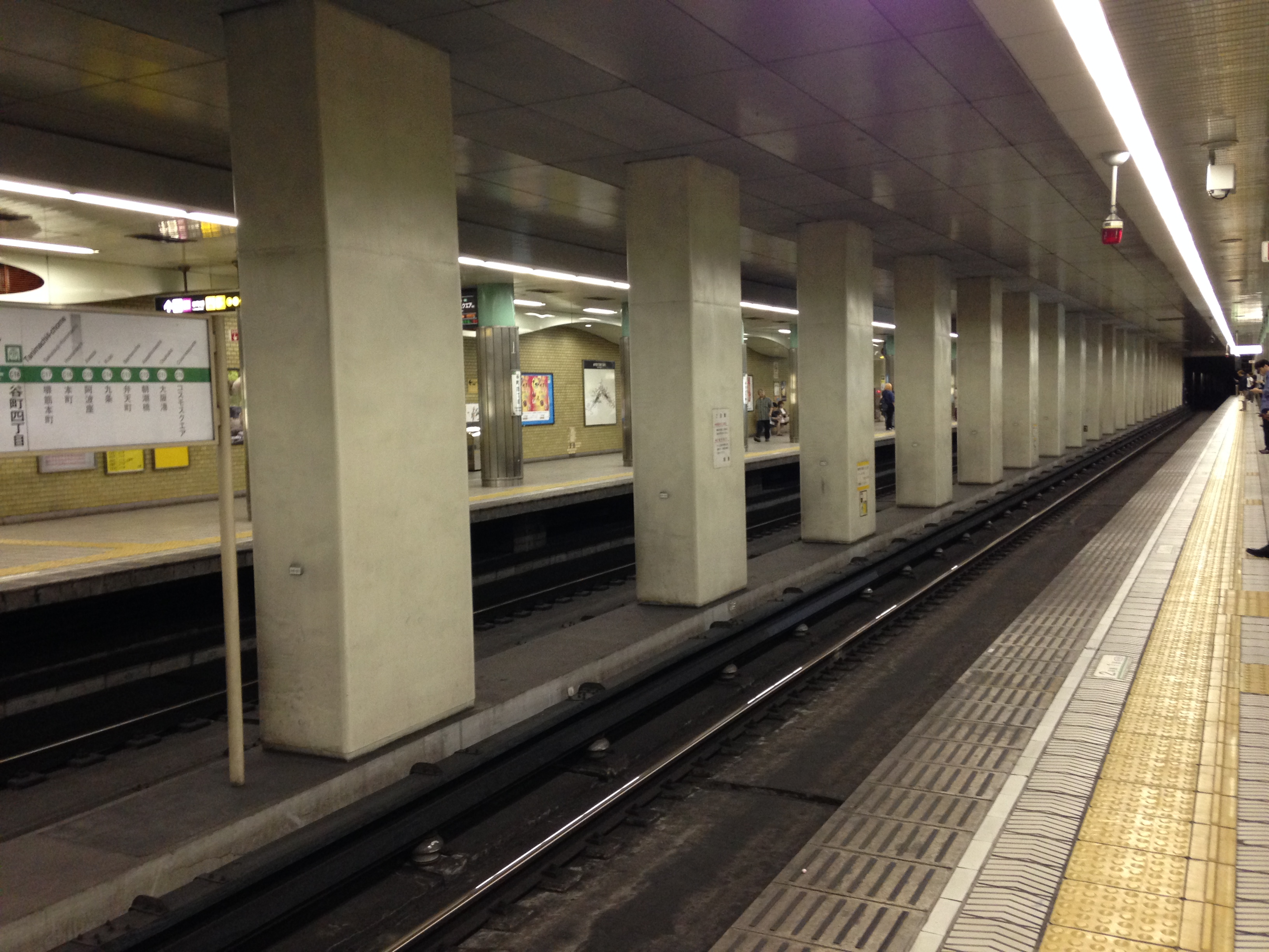 谷町4丁目駅(大阪市営地下鉄中央線)のホーム